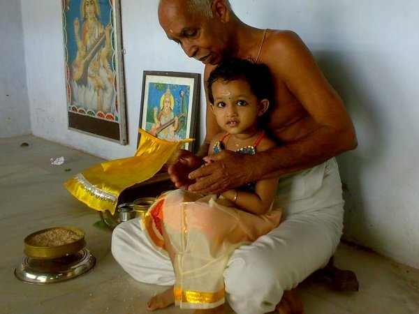 വിദ്യാരംഭം